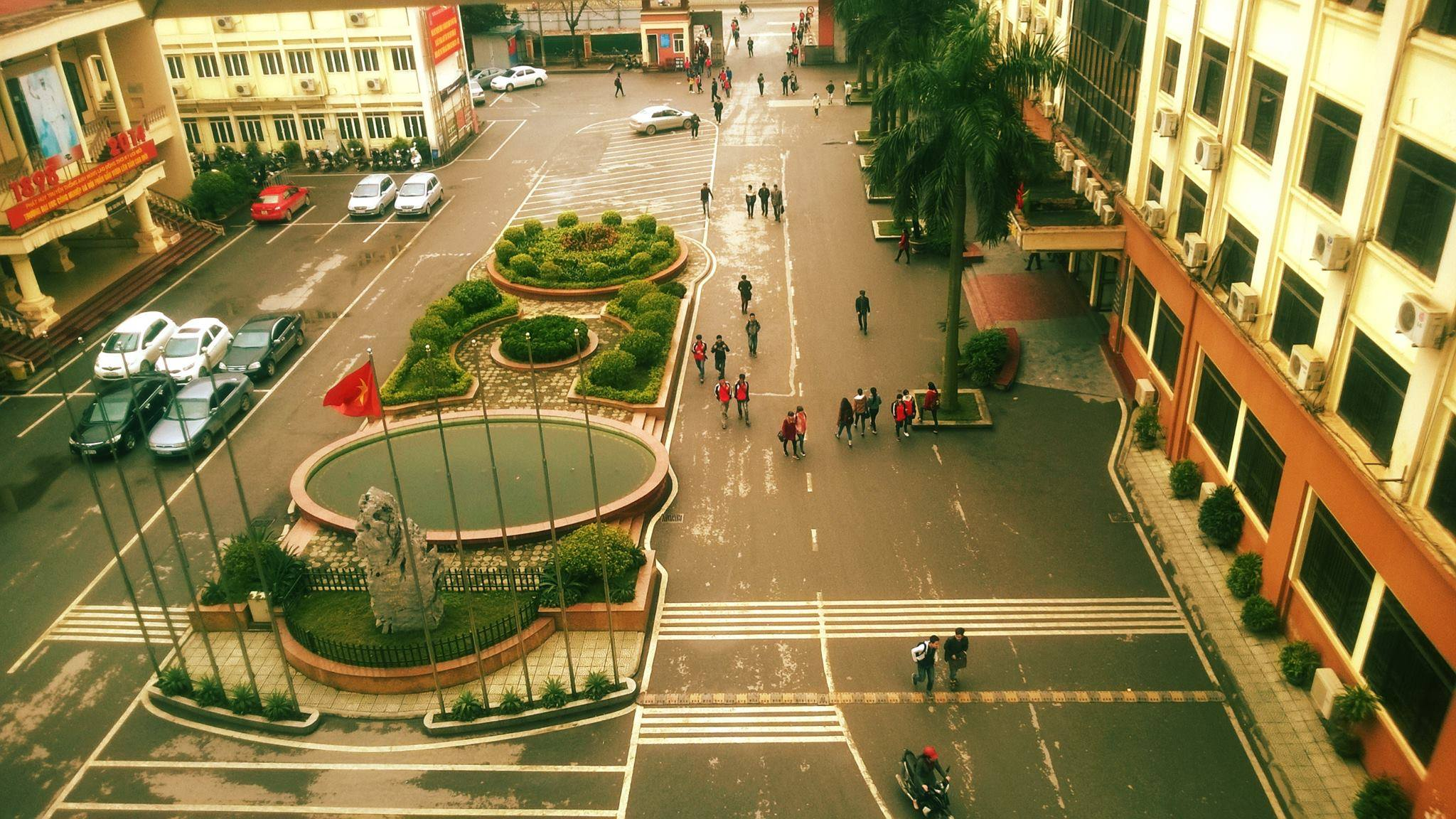 chụp từ nhà A1